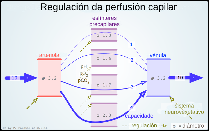 Diagrama dos factores que inflúen na perfusión capilar